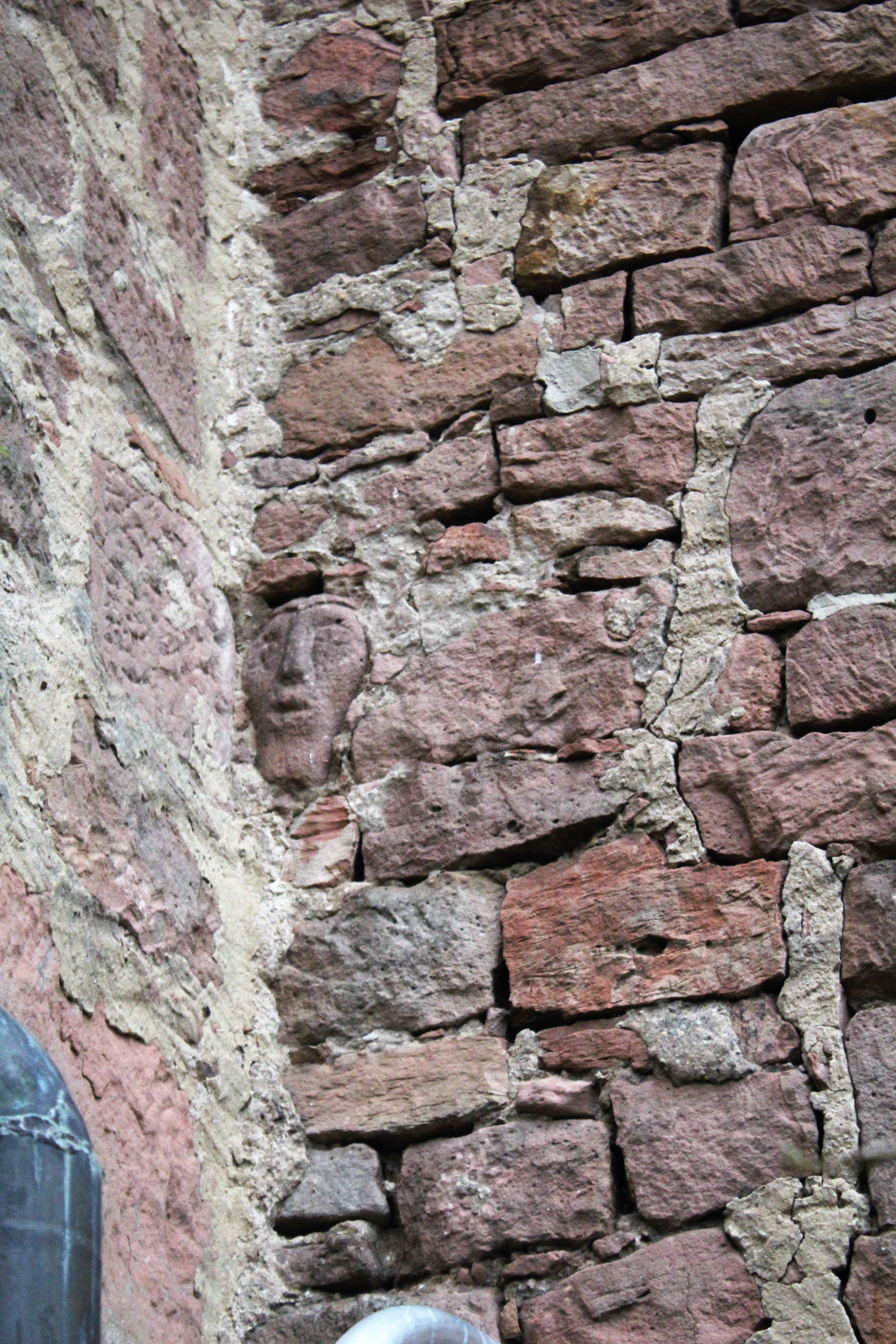 Evangelische Kirche Niedergründau, Gemeinde Gründau, Main-Kinzig-Kreis, Hessen, Deutschland